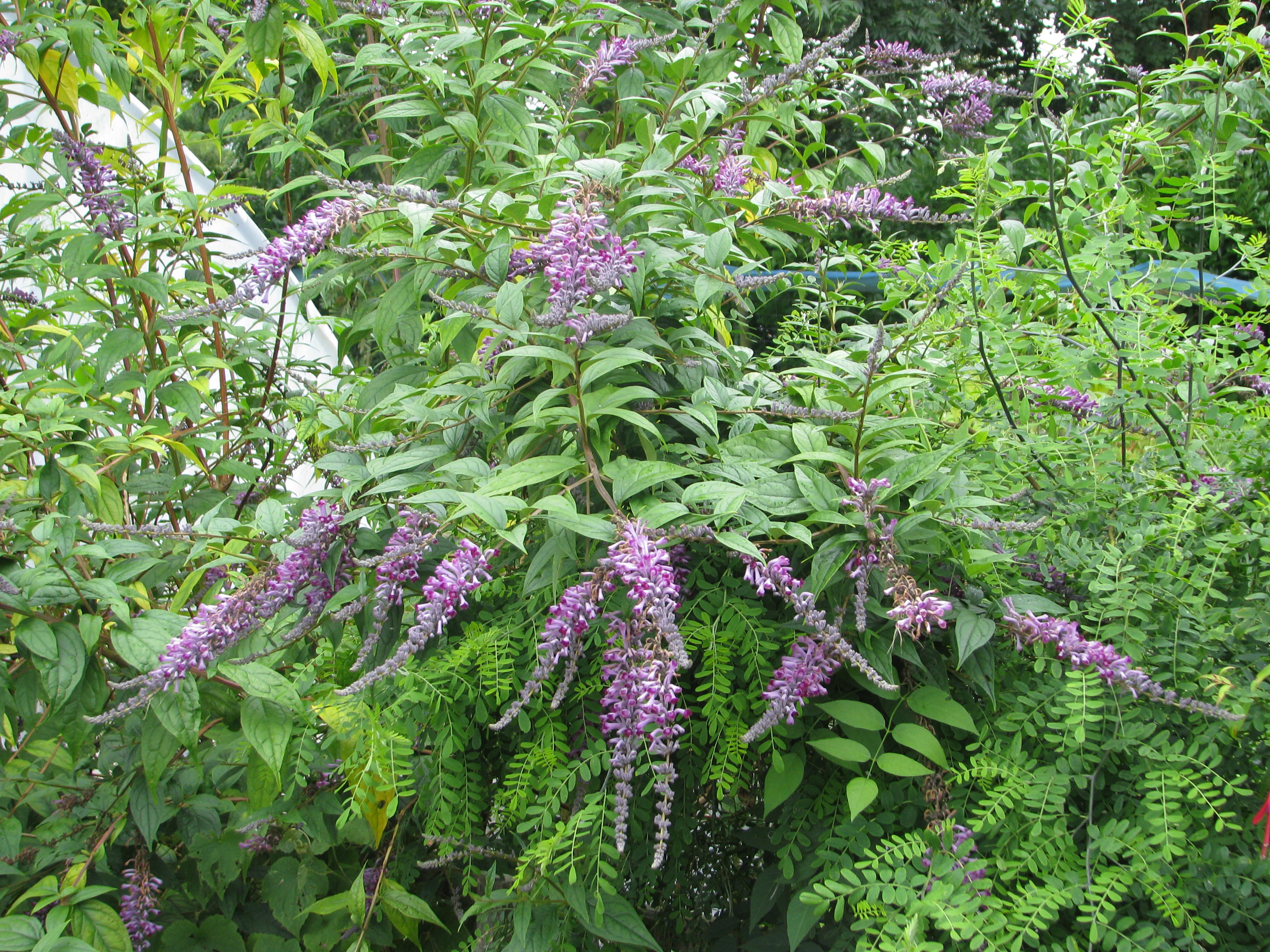 Buddleja lindleyana